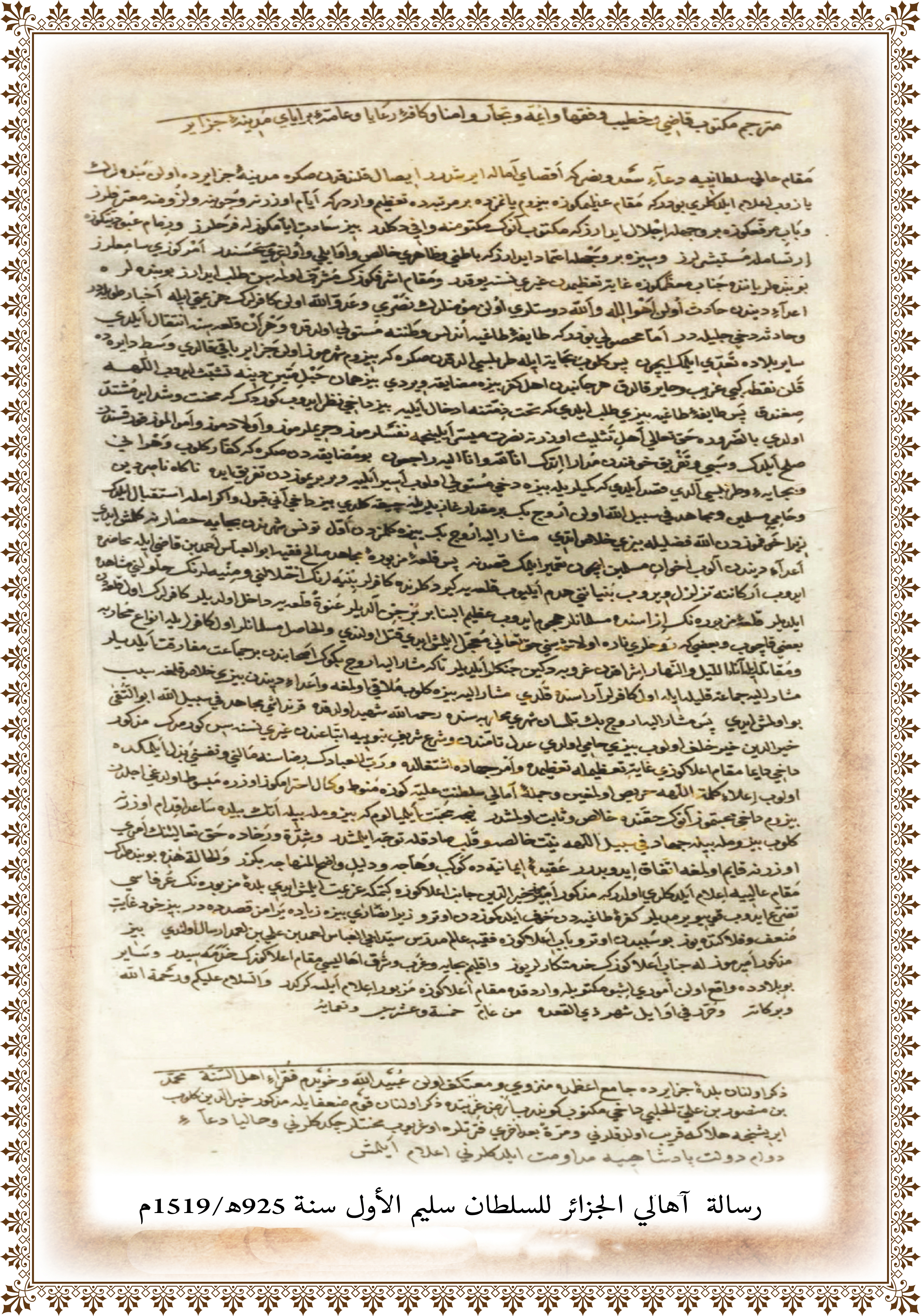 رسالة أهالي الجزائر (باللغة العثمانية) إلى السلطان سليم الأول سنة 1519م يعرضون فيها رغبتهم ضم الجزائر إلى الدولة العثمانية. (أرشيف قصر طوب كابي، إسطنبول. رقم: 6456)